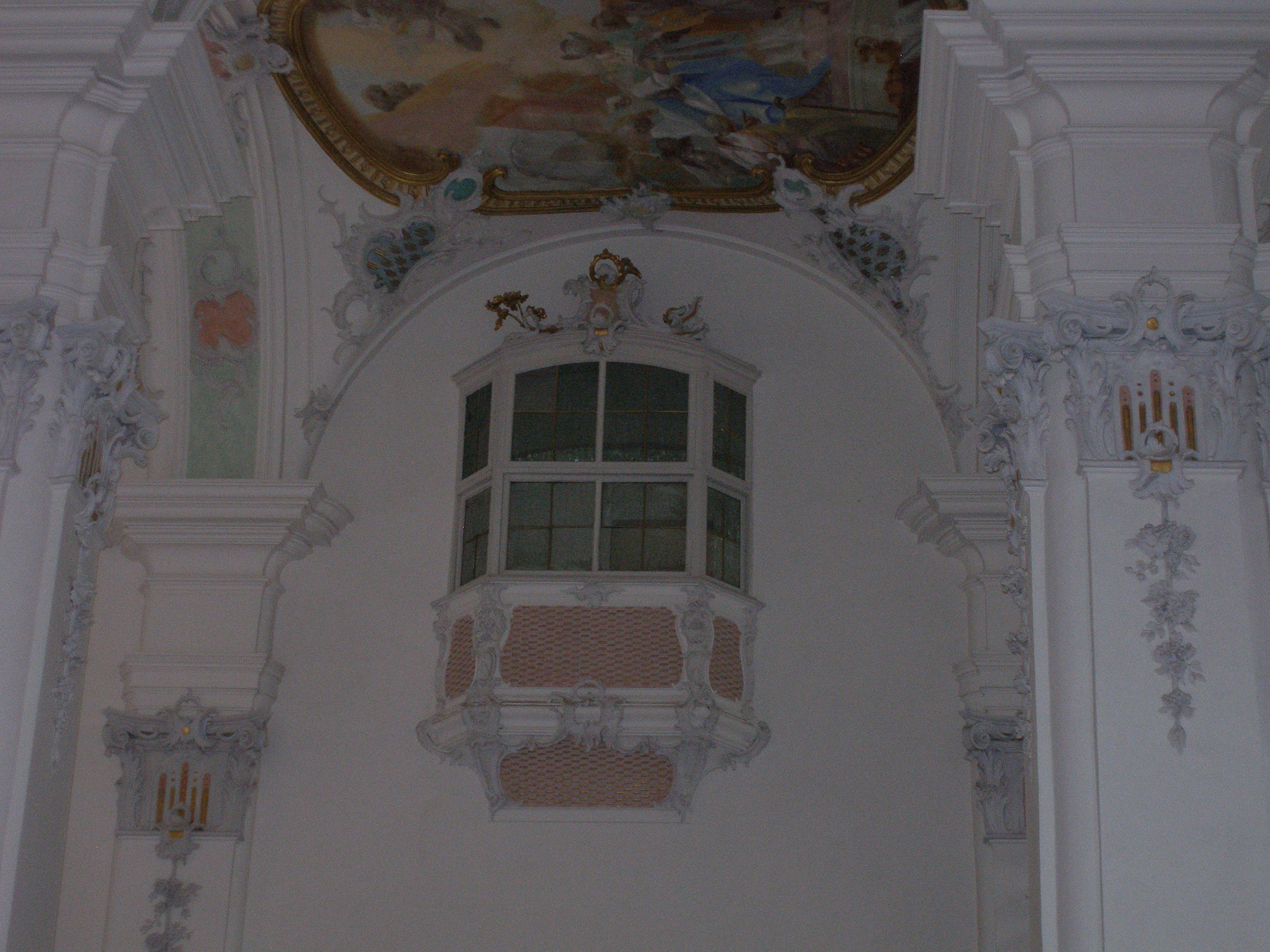 Pfarrkirche St. Georg und Jakobus (Isny)